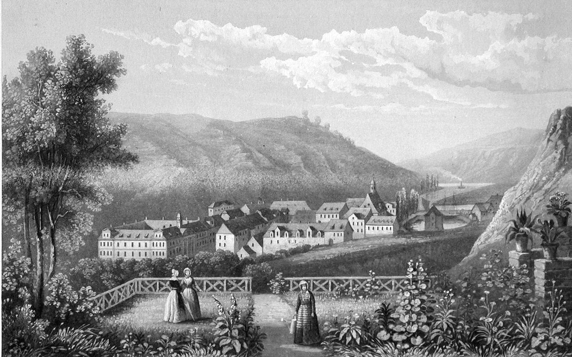 Bad Karlshafen, 1840, Stahlstich auf Papier · schwarz-weiß